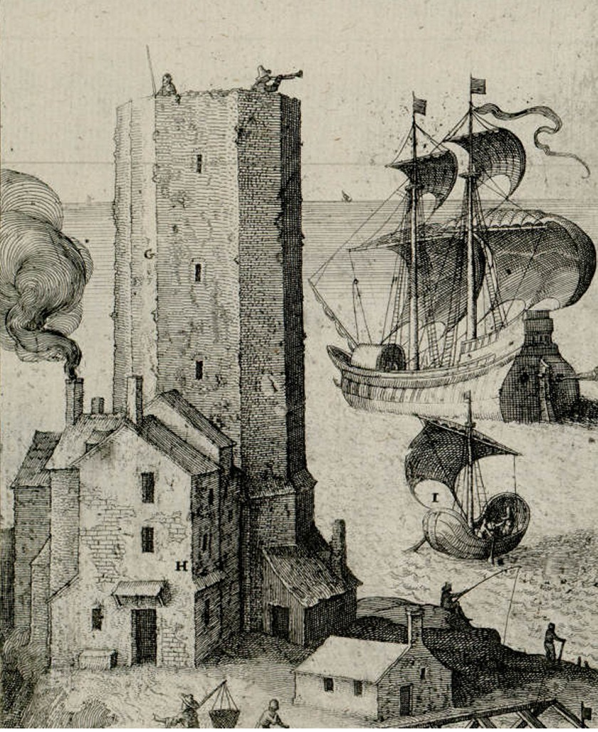 Dessin représentant la Tour du prince Noir juste avant la construction du Phare de Cordouan par Louis de Foix, à partir de 1592. Légende : "Vue d'une Tour de Cordouan antérieure à celle de louis de Foix, d'après Chastillon"